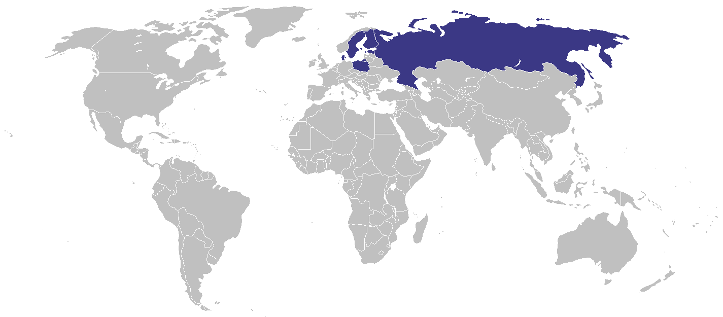 Карта стран с кофейнями "Wayne's Coffee"